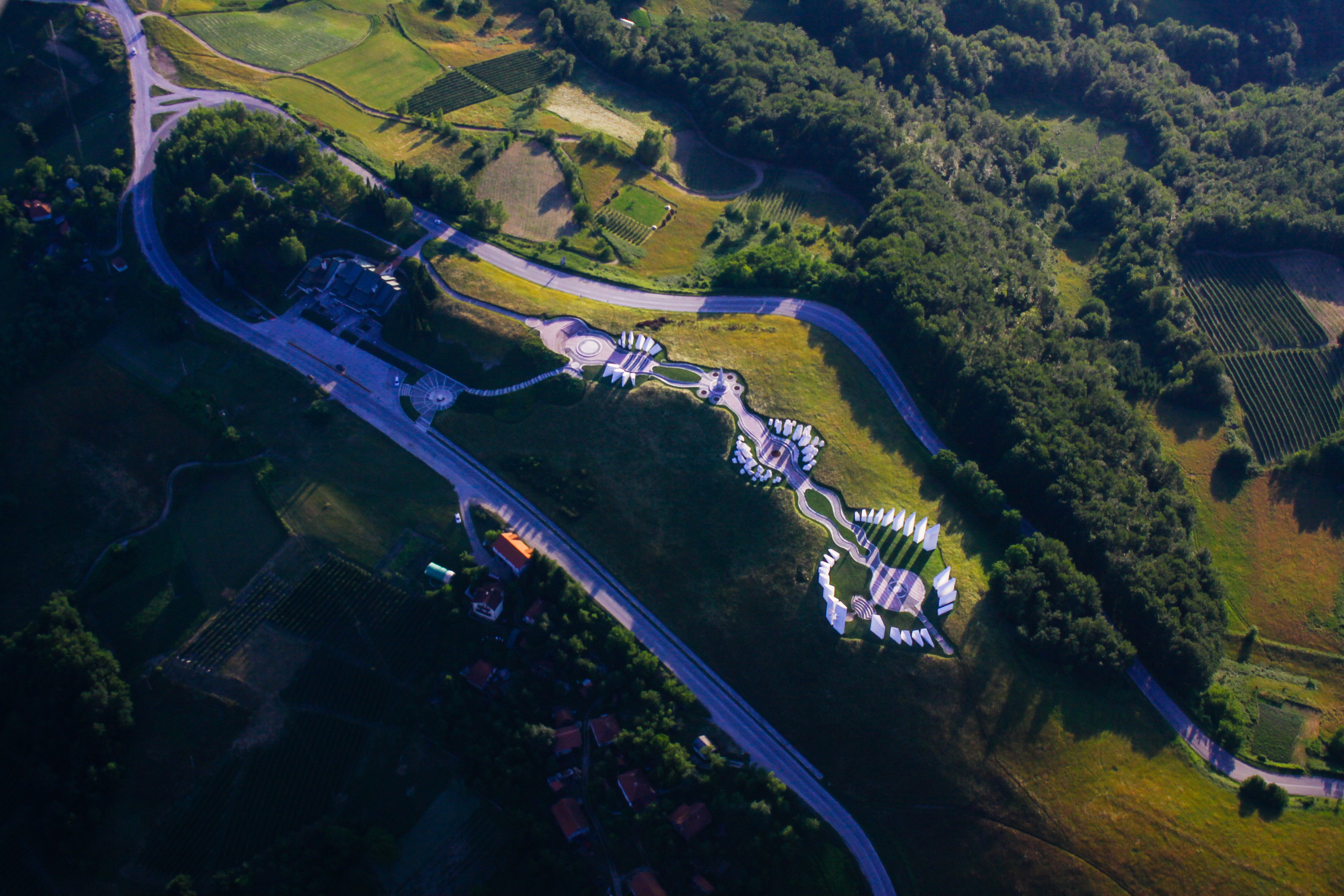 Ово је фотографија заштићеног природног добра у Србији под шифром: МПС25 This is a a photo of a natural area in Serbia with ID: МПС25 Меморијални природни споменик Кадињача